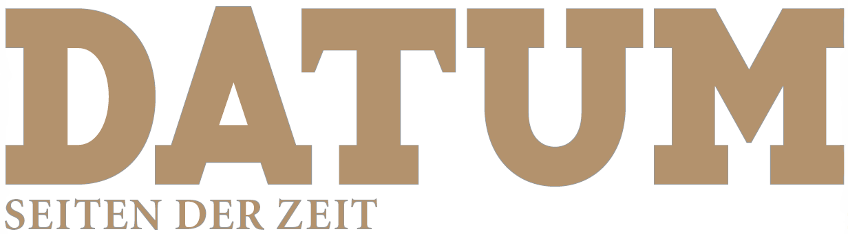 Logo der Zeitschrift Datum